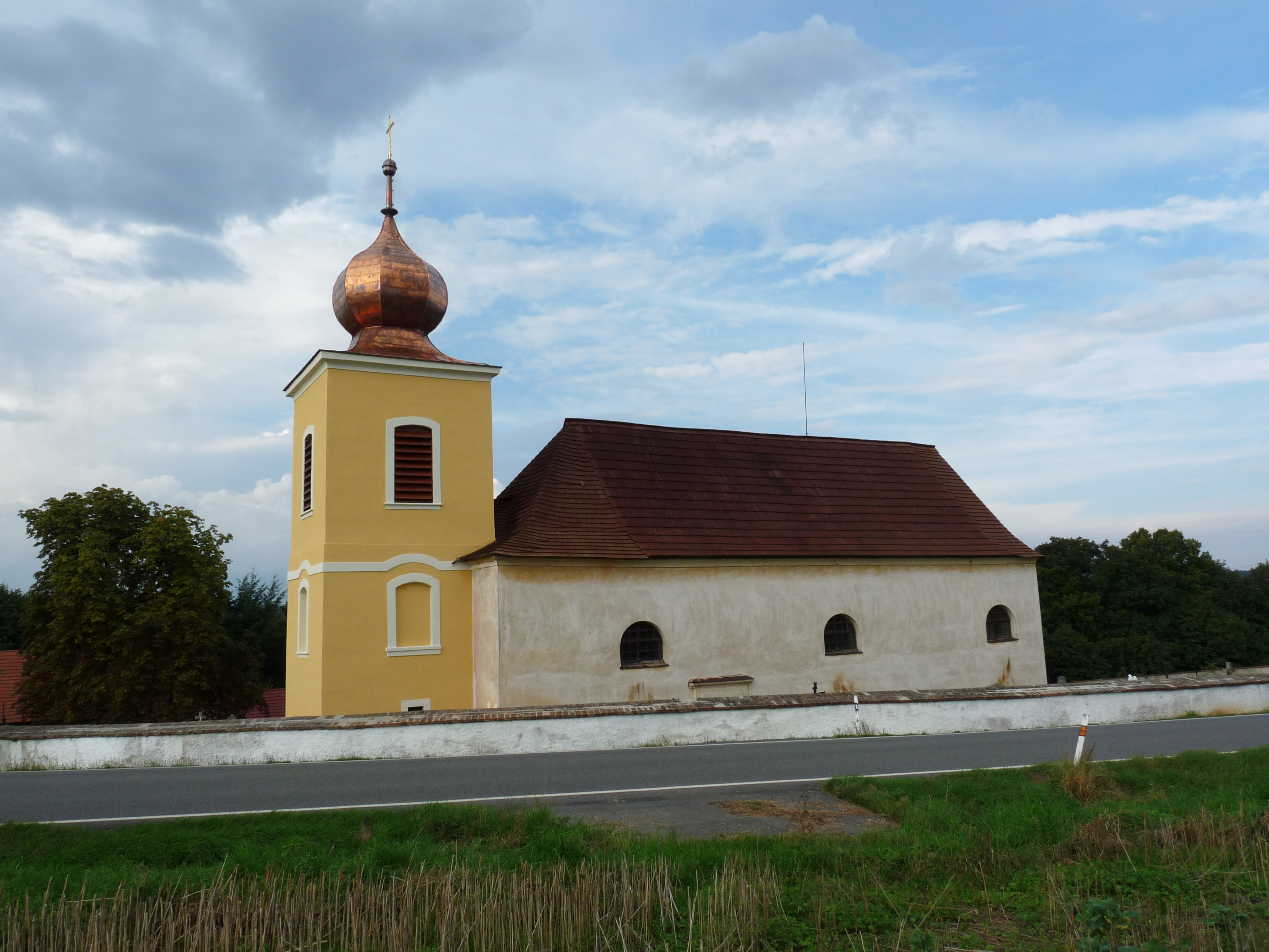 Kostel svatých Petra a Pavla, návrší nad vsí, Křečov.